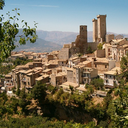 Pacentro (Provincie l'Aquila)